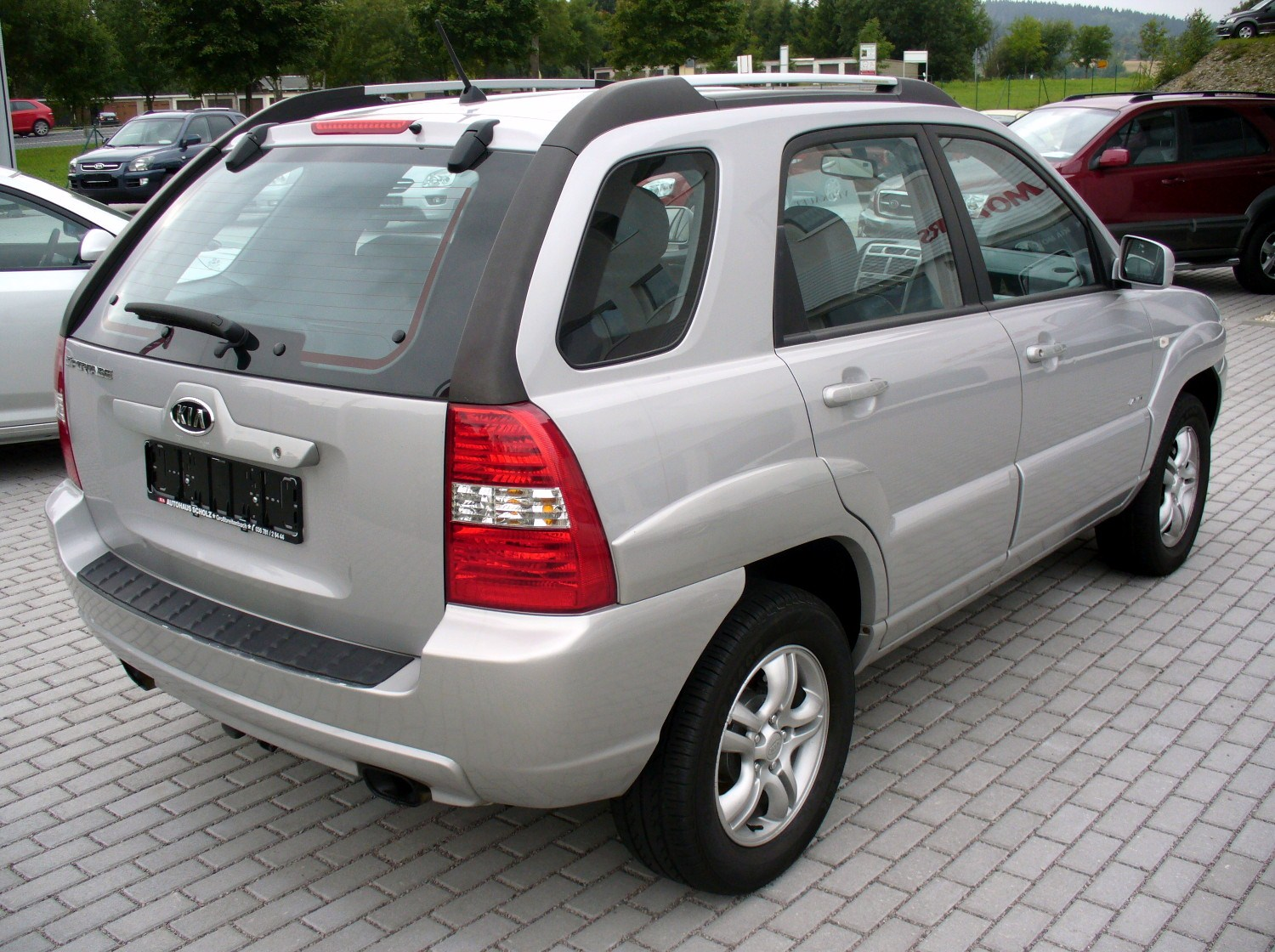 Kia Sportage